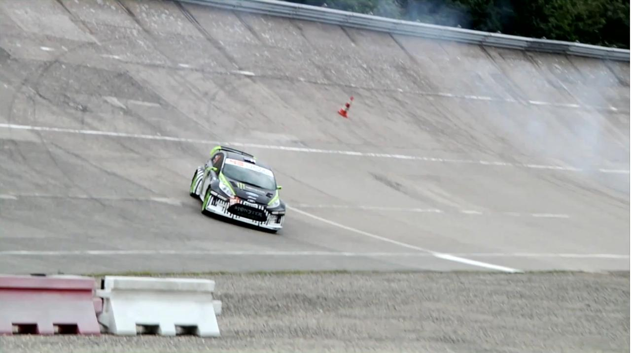 Ken block à Linas-Monthléry